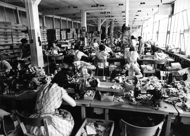 Giengen/Württemberg Firma Steiff GmbH Bearbeitung der Tierkörper (Nähen)